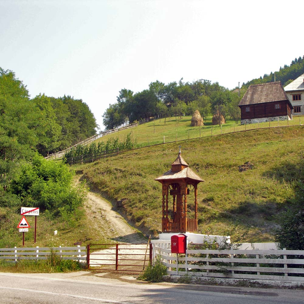 Das Cloșca-Gedenkhaus in Cărpiniș, Kreis Alba, Rumänien